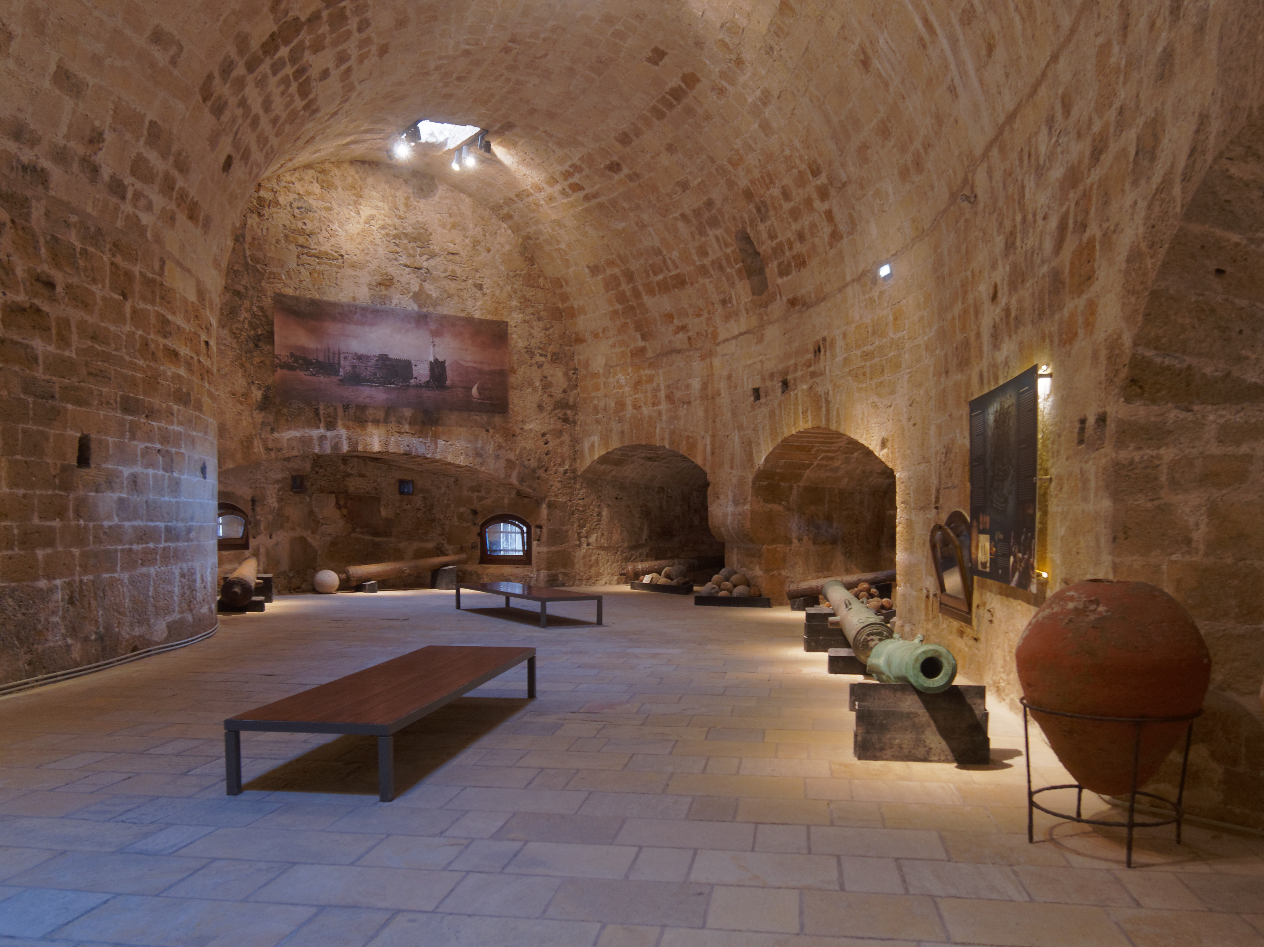 Θαλάσσιο Φρούριο ενετικού λιμένος Ηρακλείου (Κούλες)«Κούλες»